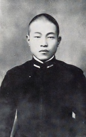 岩瀬勝輔の肖像写真。